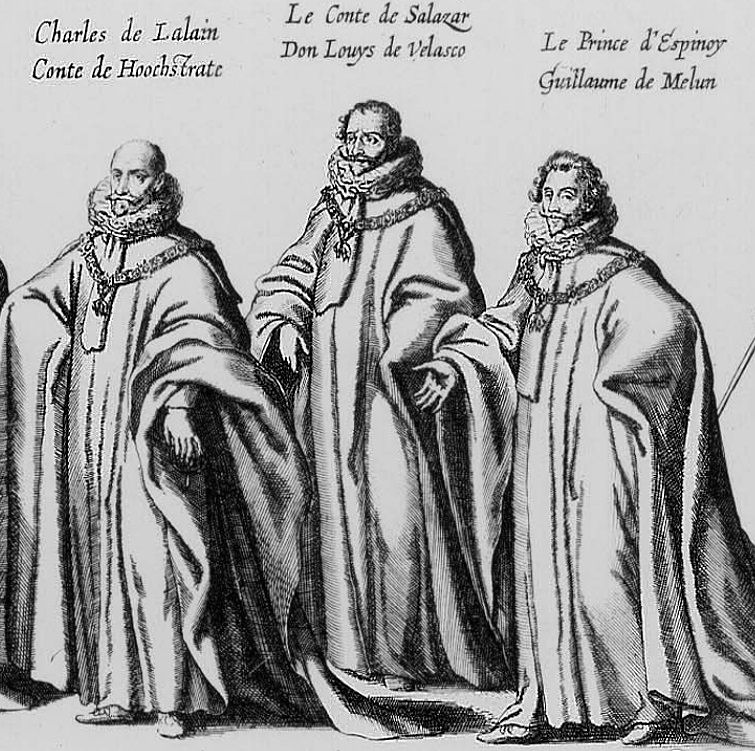 Pompes funèbres de l'archiduc Albert d'Autriche à Bruxelles / Série de 65 gravures d'un recueil relatant les funérailles d'Albert d'Autriche à Bruxelles le 11 mars 1622.